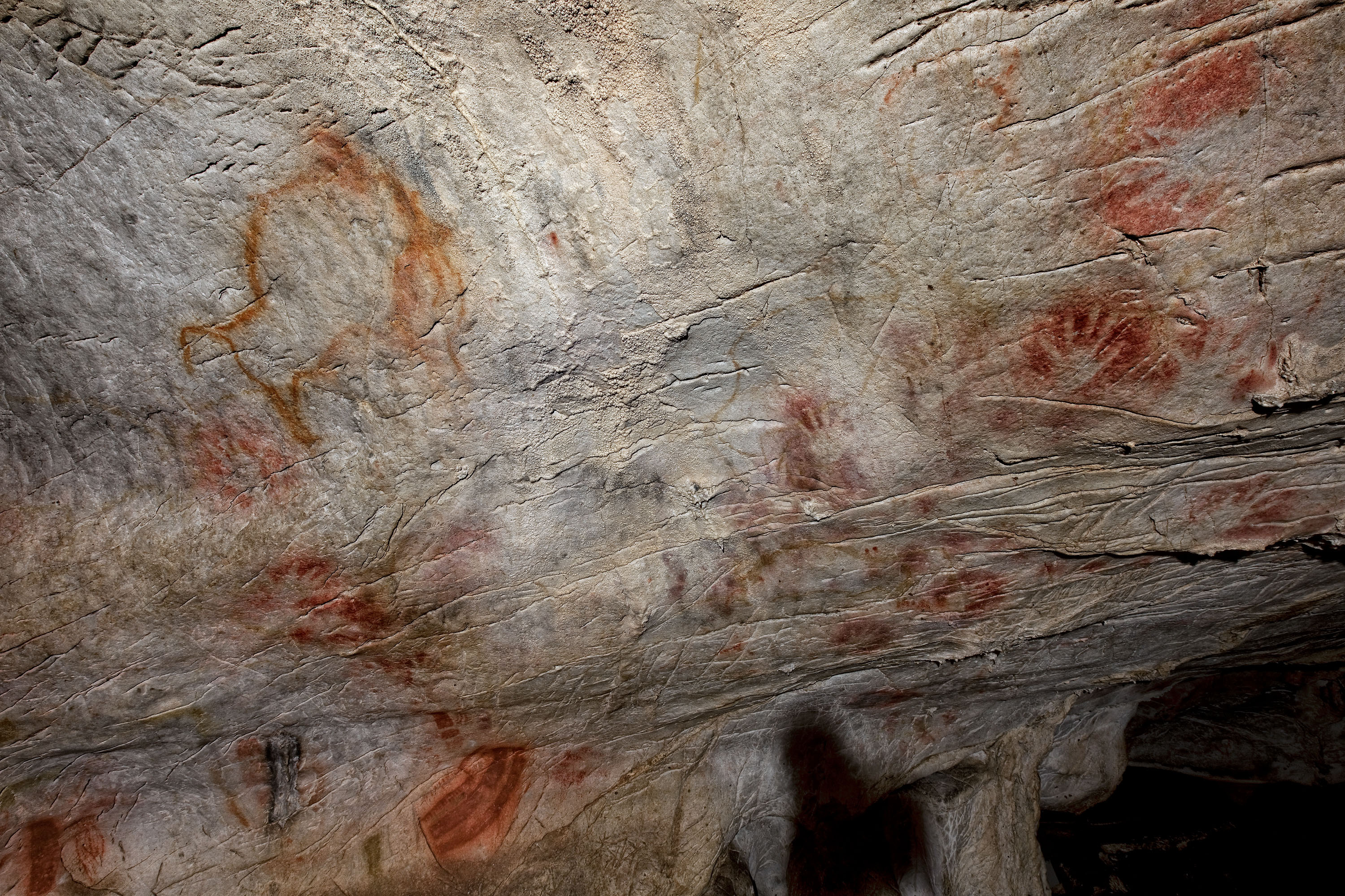 Panel de la manos de la cueva del El Castillo, Cantabria (España). El bisonte es Magdaleniense, pero algunos de los símbolos rojs de este panel son las pinturas más antiguas encontradas en Europa, con unos 40000 años.